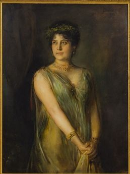 Emma Berndl als Iphigenie